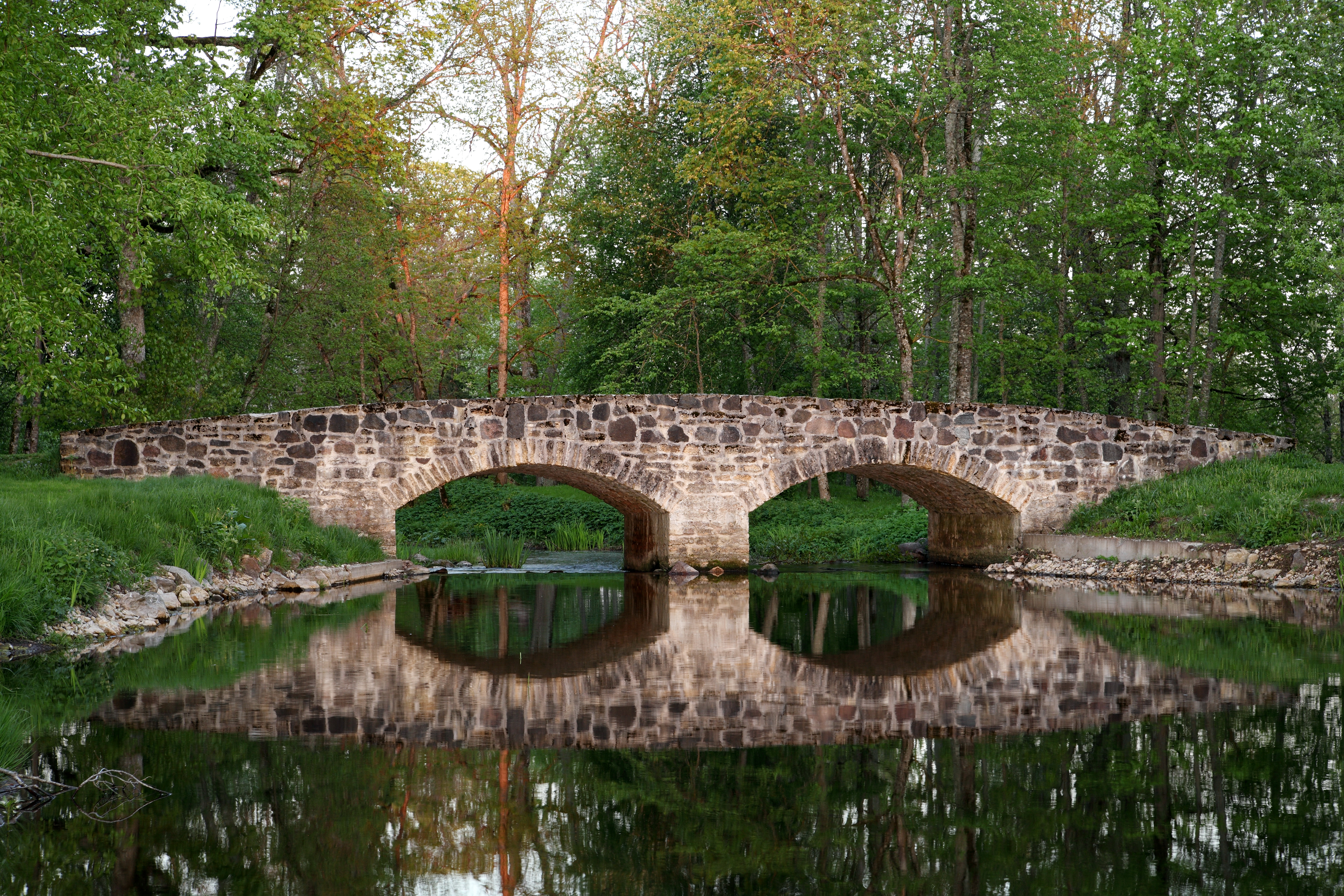 Ambla jõgi ja kivisild Albu mõisa pargis.